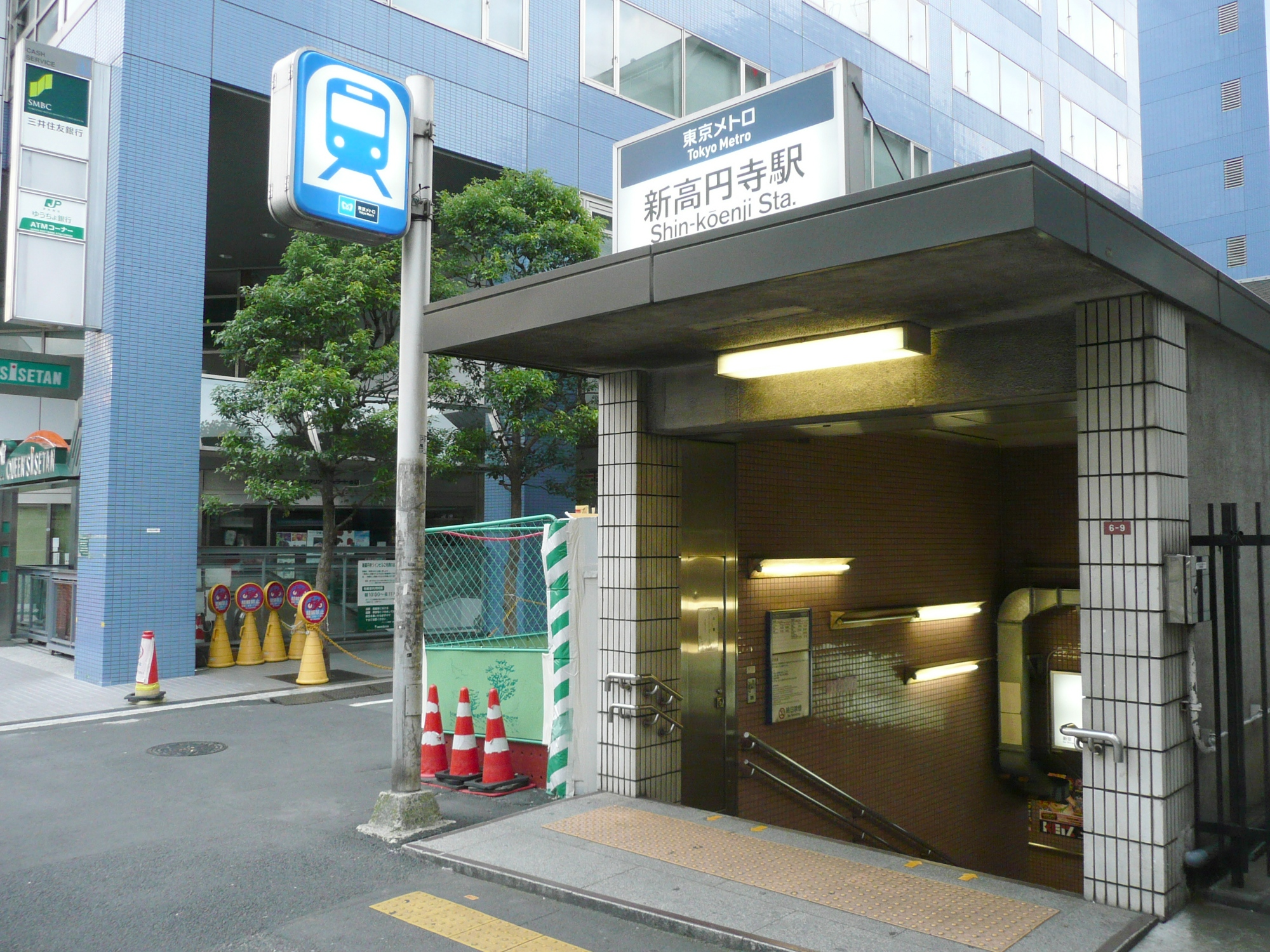 新高円寺駅1番出入口